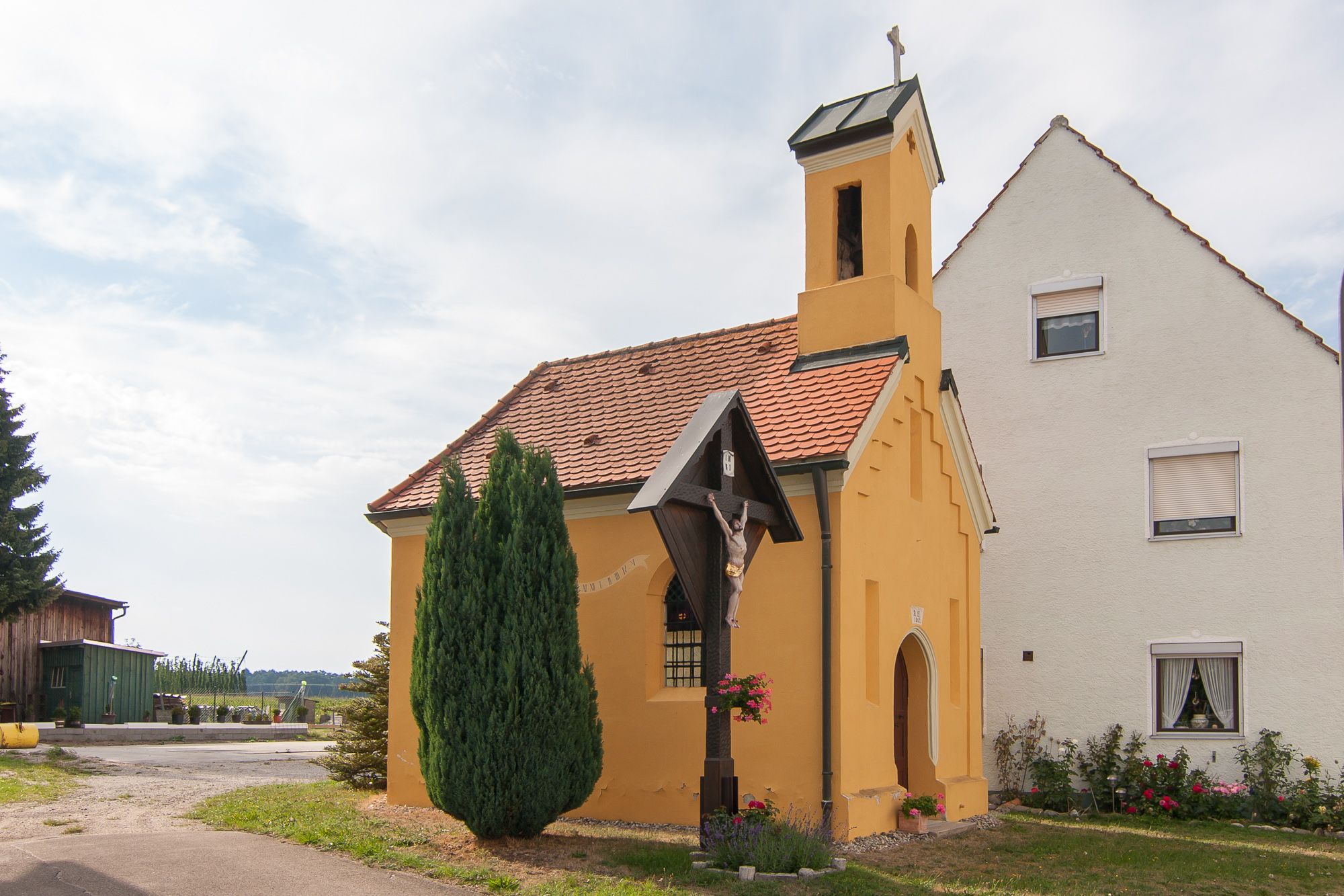 Kapelle; neugotisch, 1867; mit Ausstattung.This is a photograph of an architectural monument.